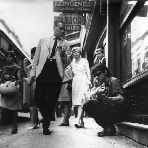 "Tanguito en 1968, en la Farmacia Suiza de Maipú al 700, después del éxito de "La balsa"."[1]